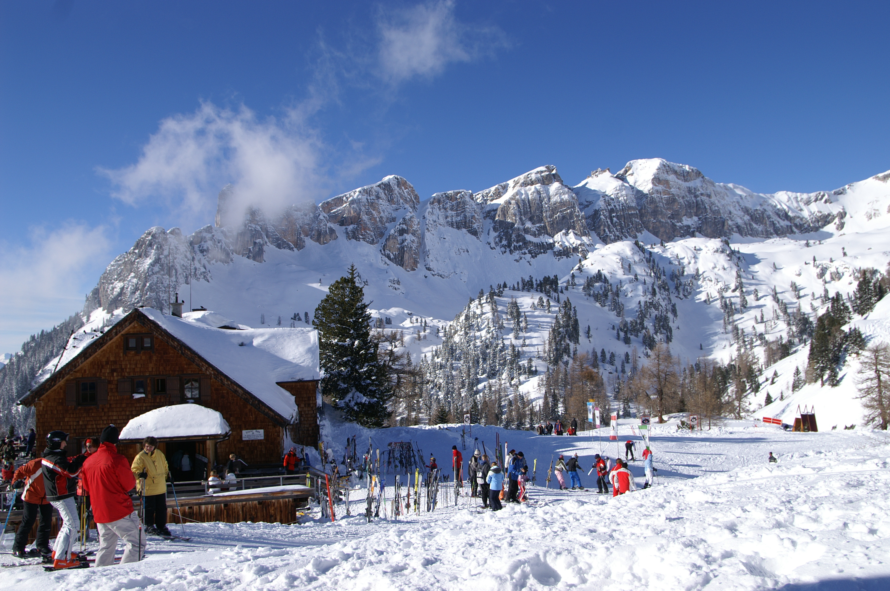 Mauritzalm Hochleger im Skigebiet Rofan in Maurach am Achensee in Tirol, Im Hintergrund die Dalfazer Wände des Rofangebirges.